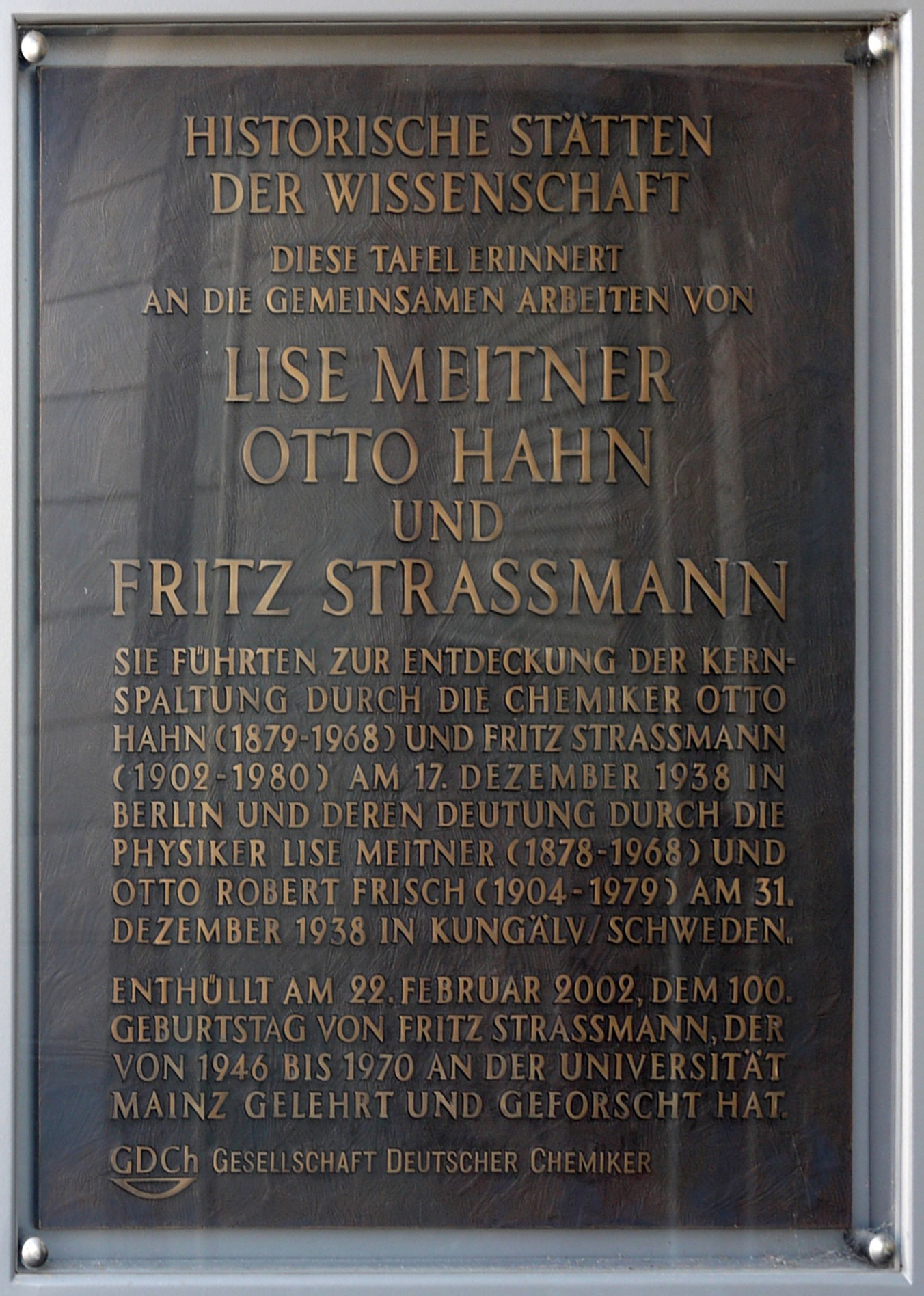 Gedenktafel "Historische Stätten der Wissenschaft" der GDCh zu Ehren Fritz Straßmanns am Institut für Kernchemie der Johannes Gutenberg - Universität Mainz